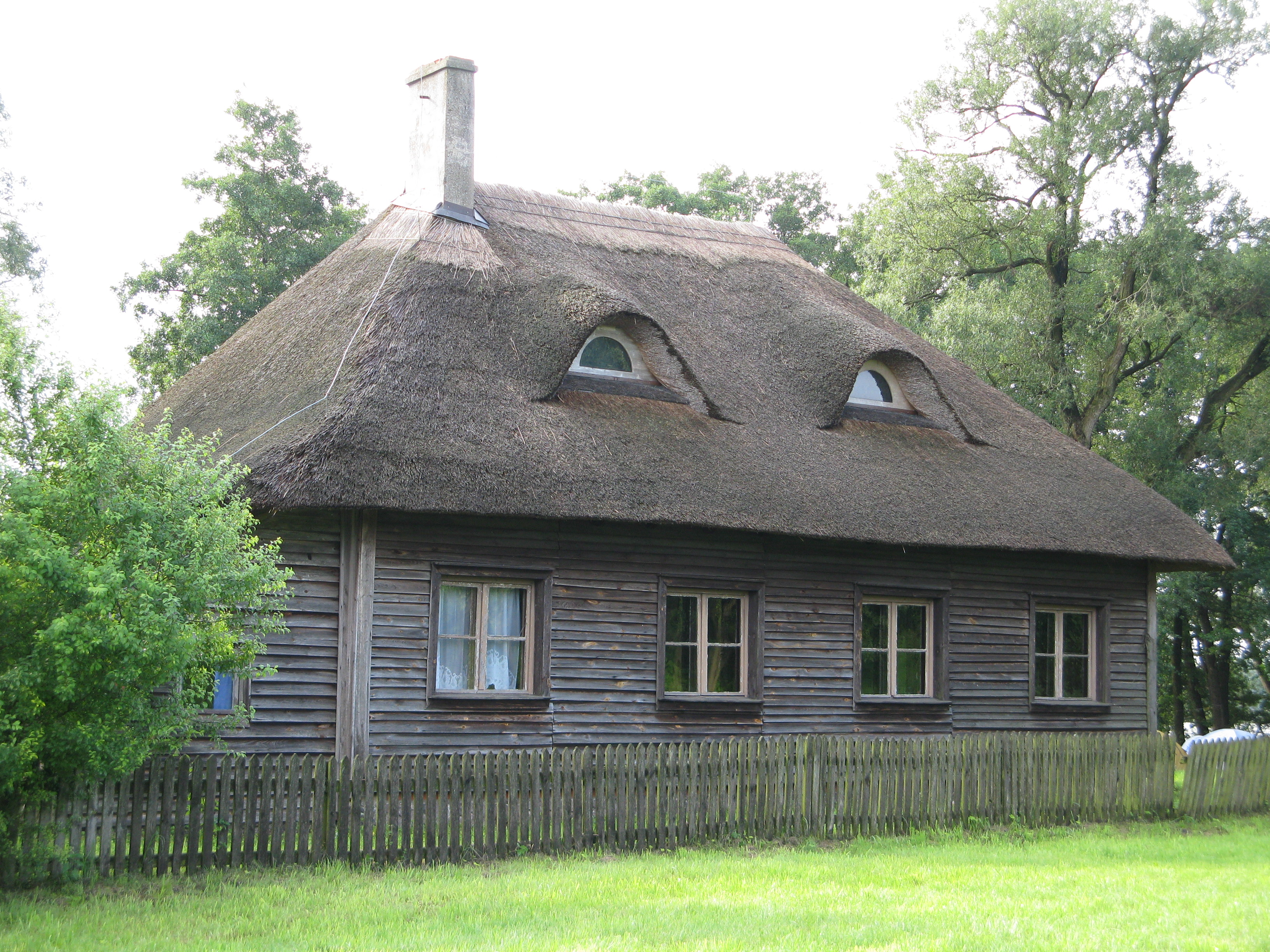 Ostrów Lednicki – wyspa na jeziorze Lednica (zabytek nr 73/78/57)